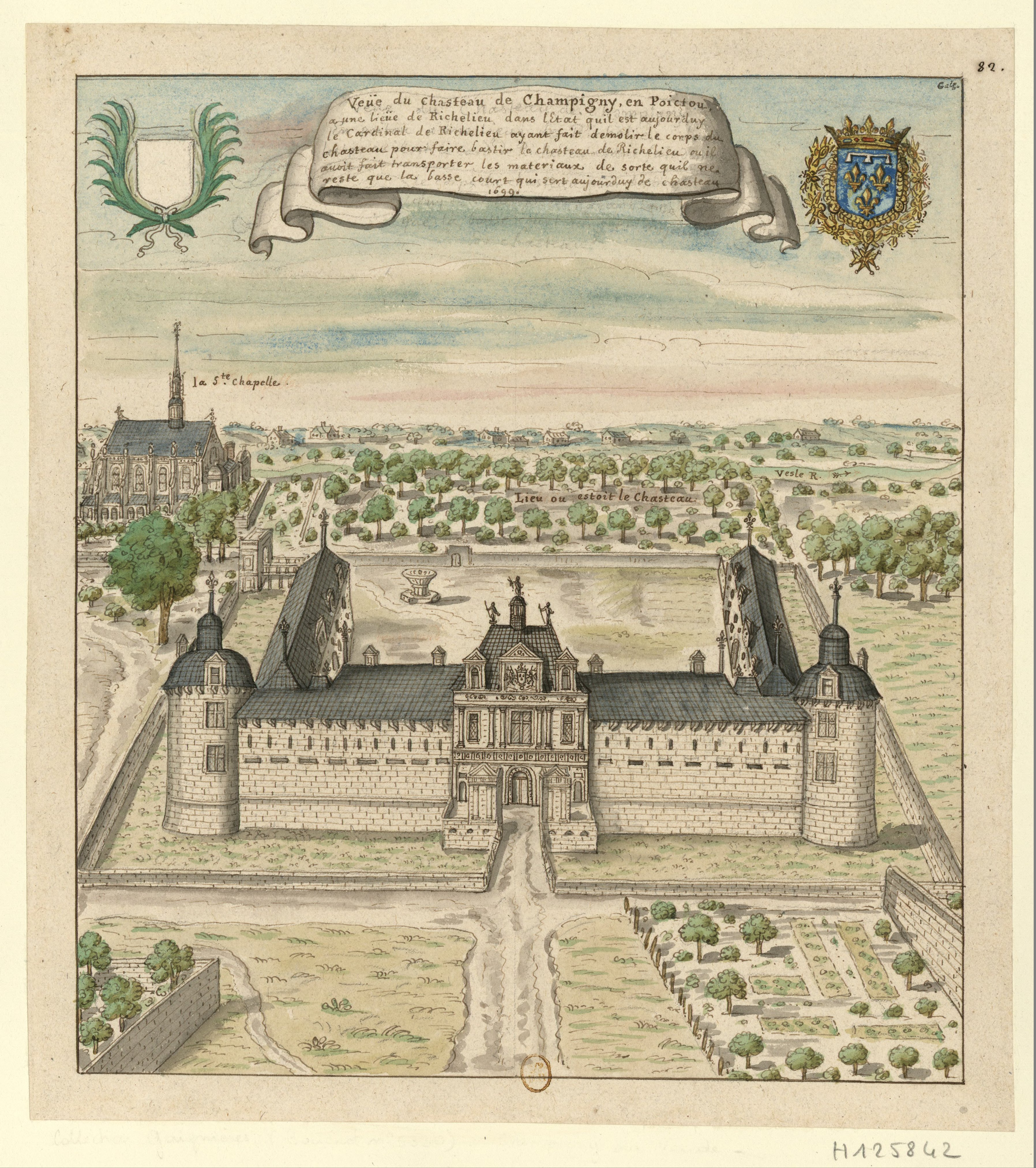 Veüe du chasteau de Champigny, en Poictou, a une lieüe de Richelieu, dans l'Etat qu'il est aujourduy. Le cardinal de Richelieu ayant fait démolir le corps du chasteau pour faire bastir le chasteau de Richelieu ou il avoit fait transporter les materiaux, de sorte qu'il ne reste que la basse court qui sert aujourduy de chasteau // 1699 : [dessin] / [Louis Boudan?]